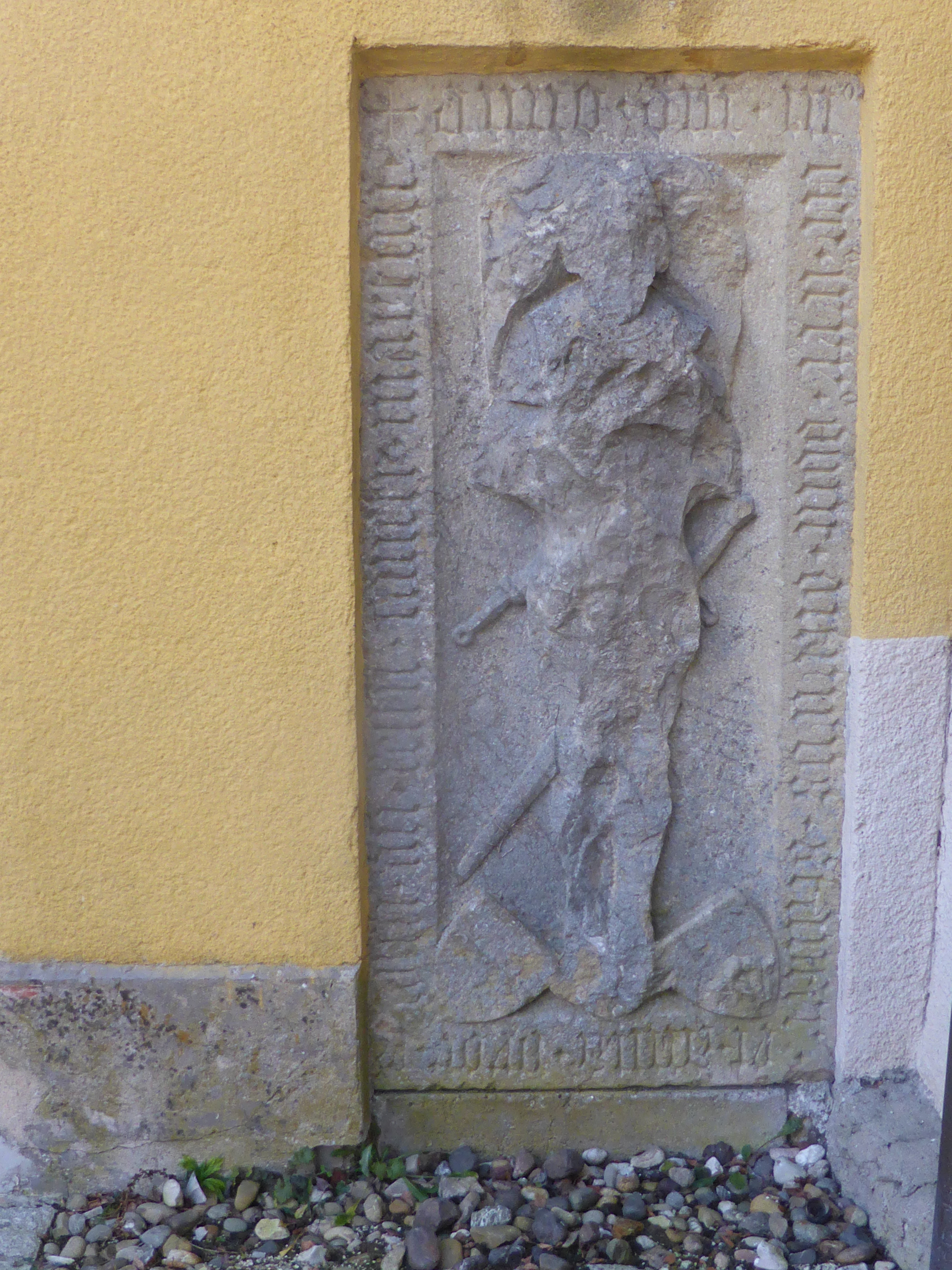 Zehenthof 1 (Beratzhausen)